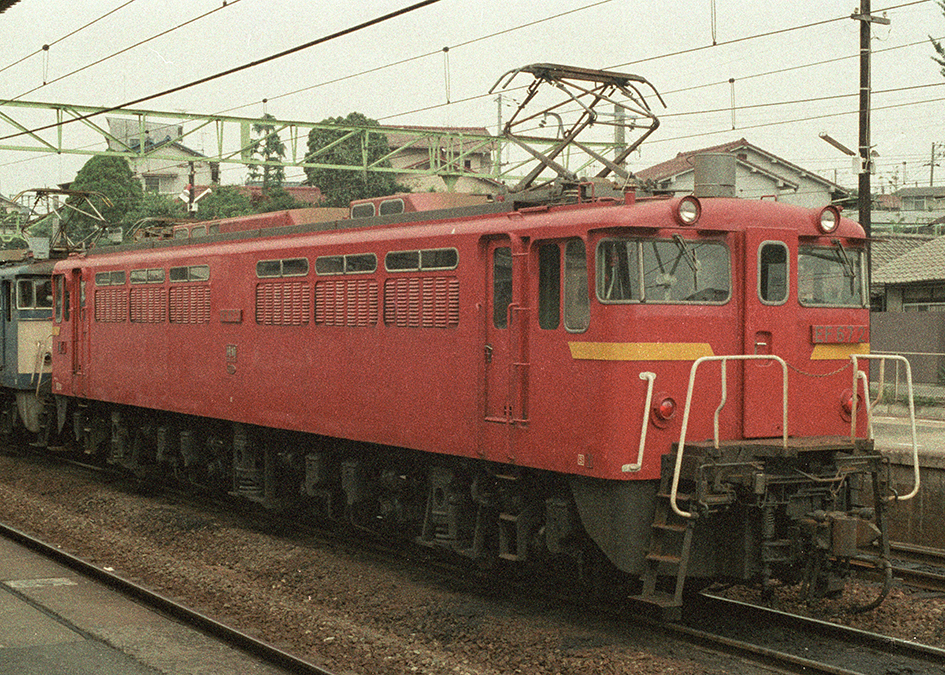 国鉄 EF67 2 西条駅にて